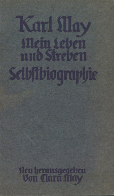 Mein Leben und Streben (May)